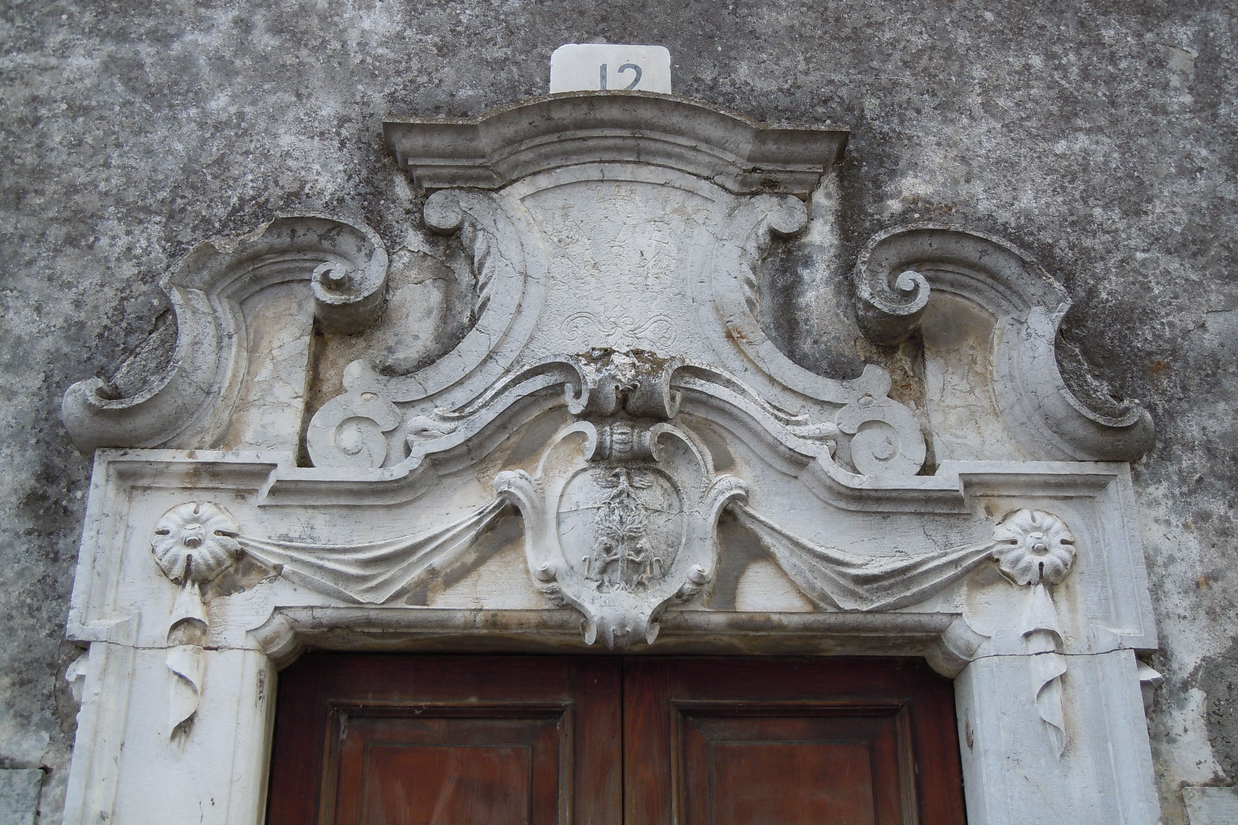 Vaccarolo, portale chiesa di S. Carlo